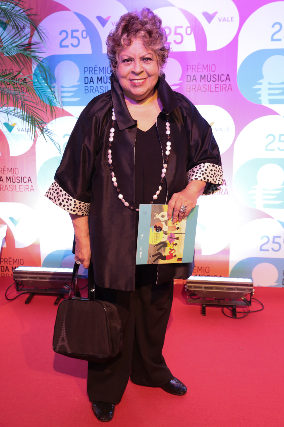 Leny Andrade durante o 25º Prêmio da Música Brasileira no Theatro Municipal. Foto: Reginaldo Teixeira (14/05/14)